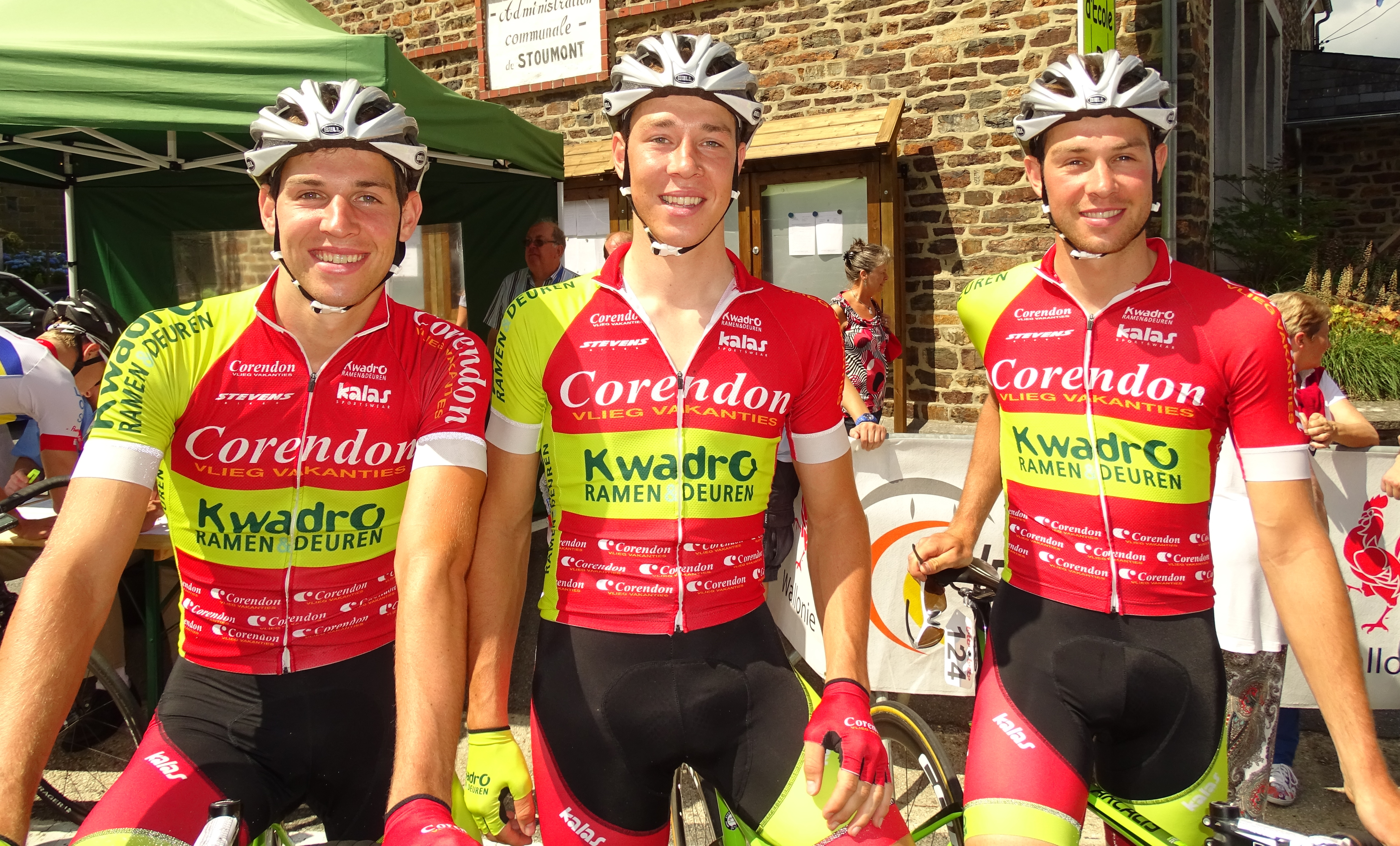 Tour de la province de Liège 2015. Depicted people: Diether Sweeck, Hendrik Sweeck and Laurens Sweeck